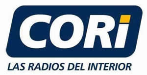 cooperativa de radioemisoras del interior